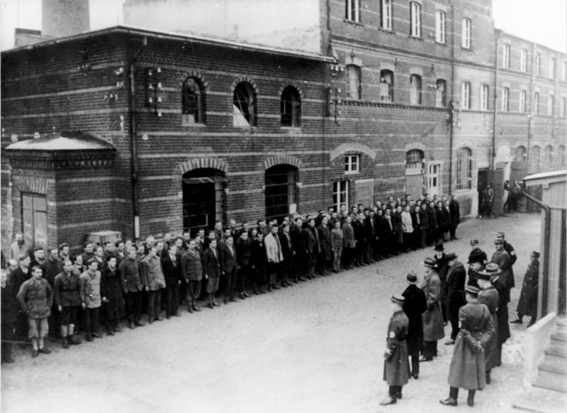 KZ Oranienburg Aus dem faschistischen KZ Oranienburg wurden am 18. Dezember 1933 300 Häftlinge entlassen; vorderste Reihe dritter von links: Polizeivizepräsident Rudo[l]f Diel[s] [originally misspelled].